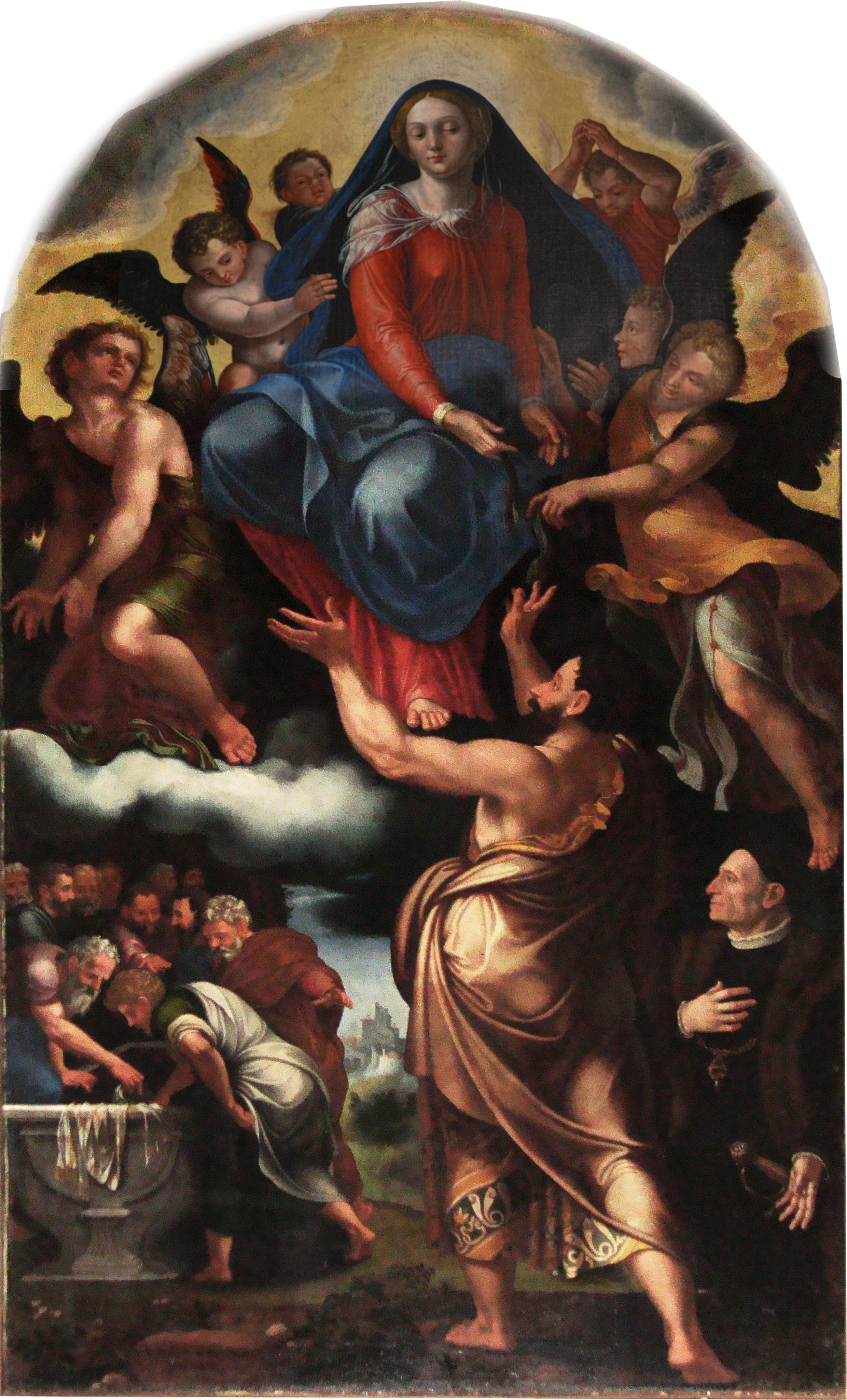 Olio su tela, (misure non precisate) l'opera si trova Oratorio della Santissima Annunziata a Ferrara